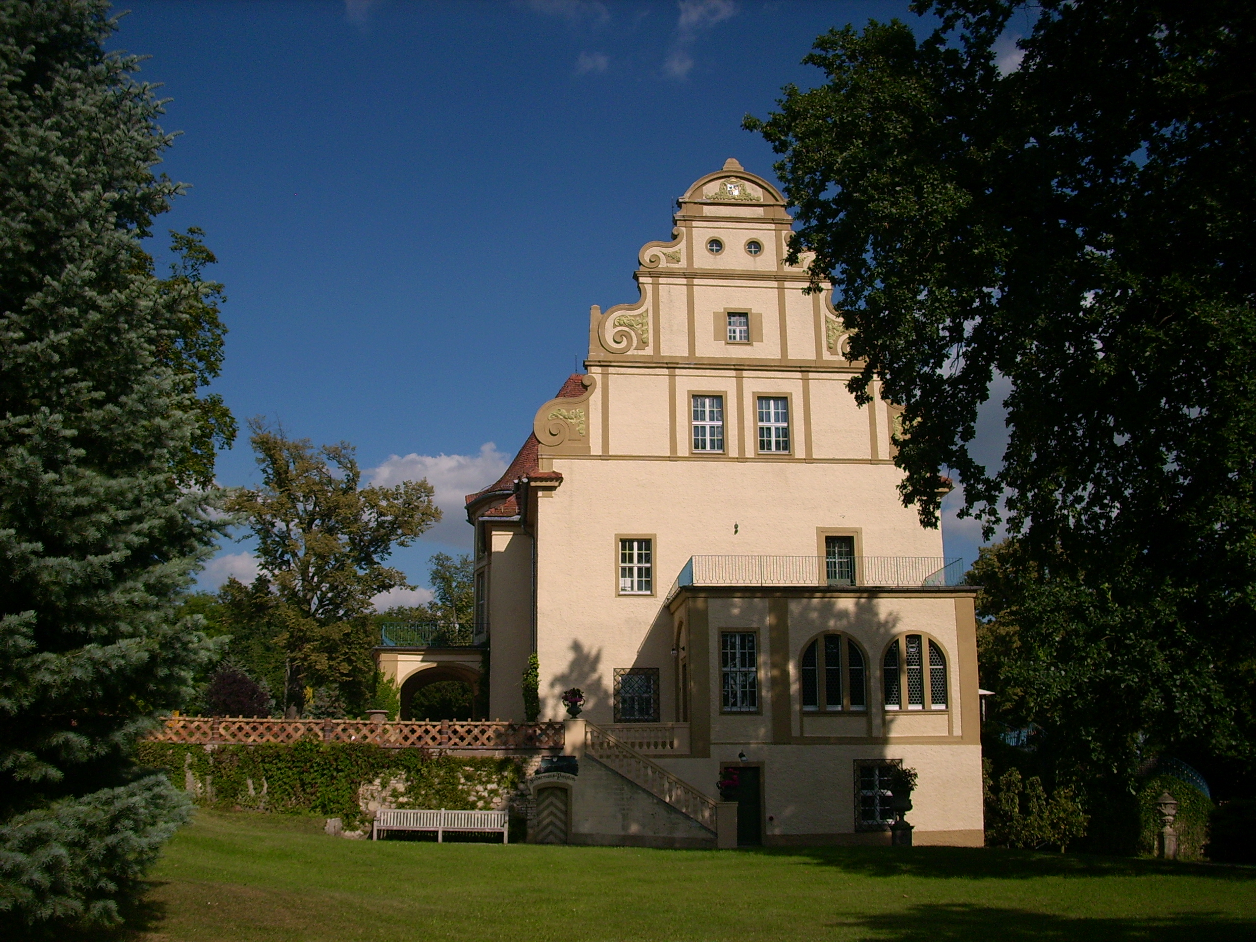 Schloss in Weißig, Ortsteil von Oßling Hornjoserbsce: Wysočanski hród w gmejnje Wóslink